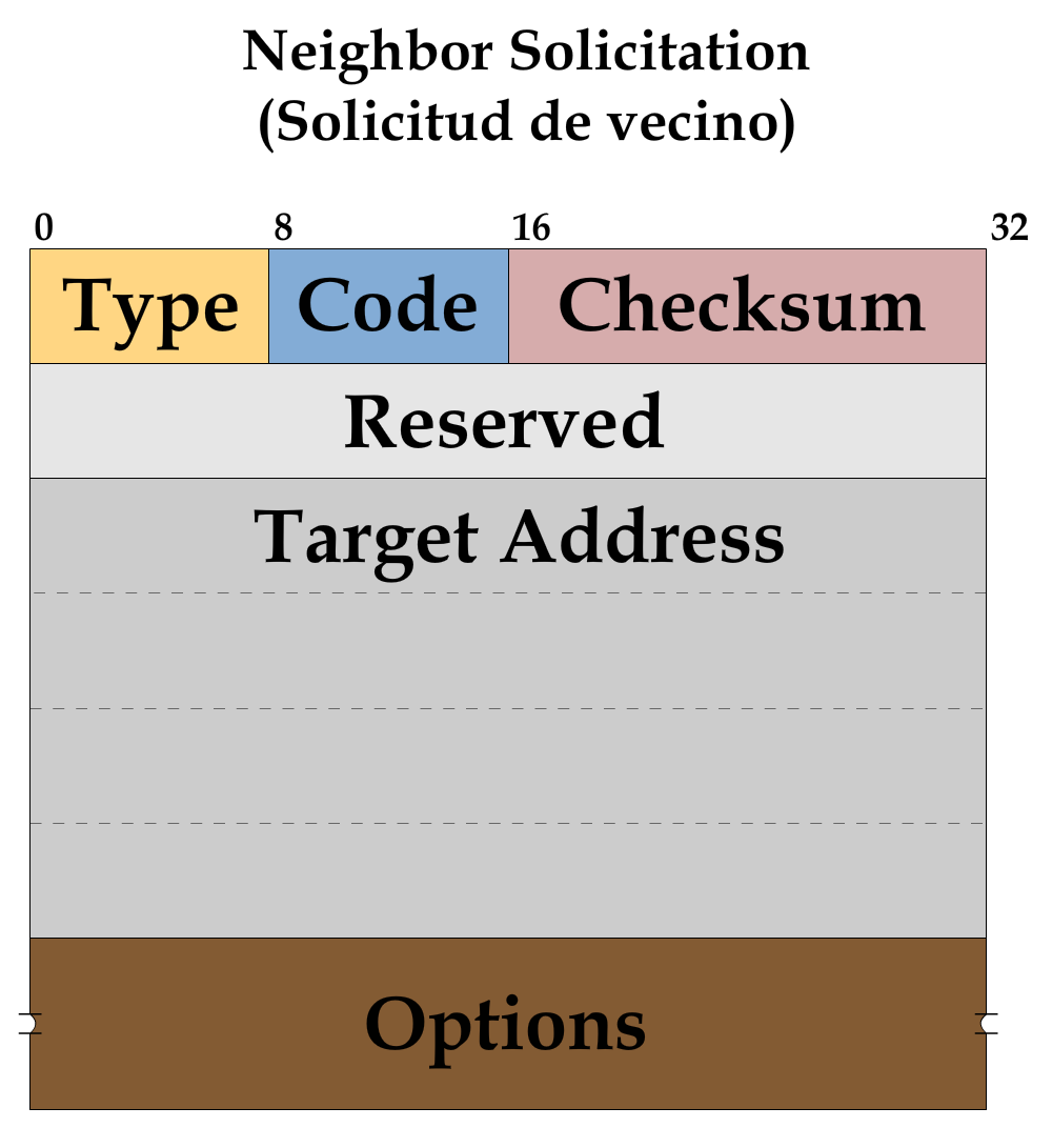 Formato de mensaje ICMPv6 Neighbor Solicitation